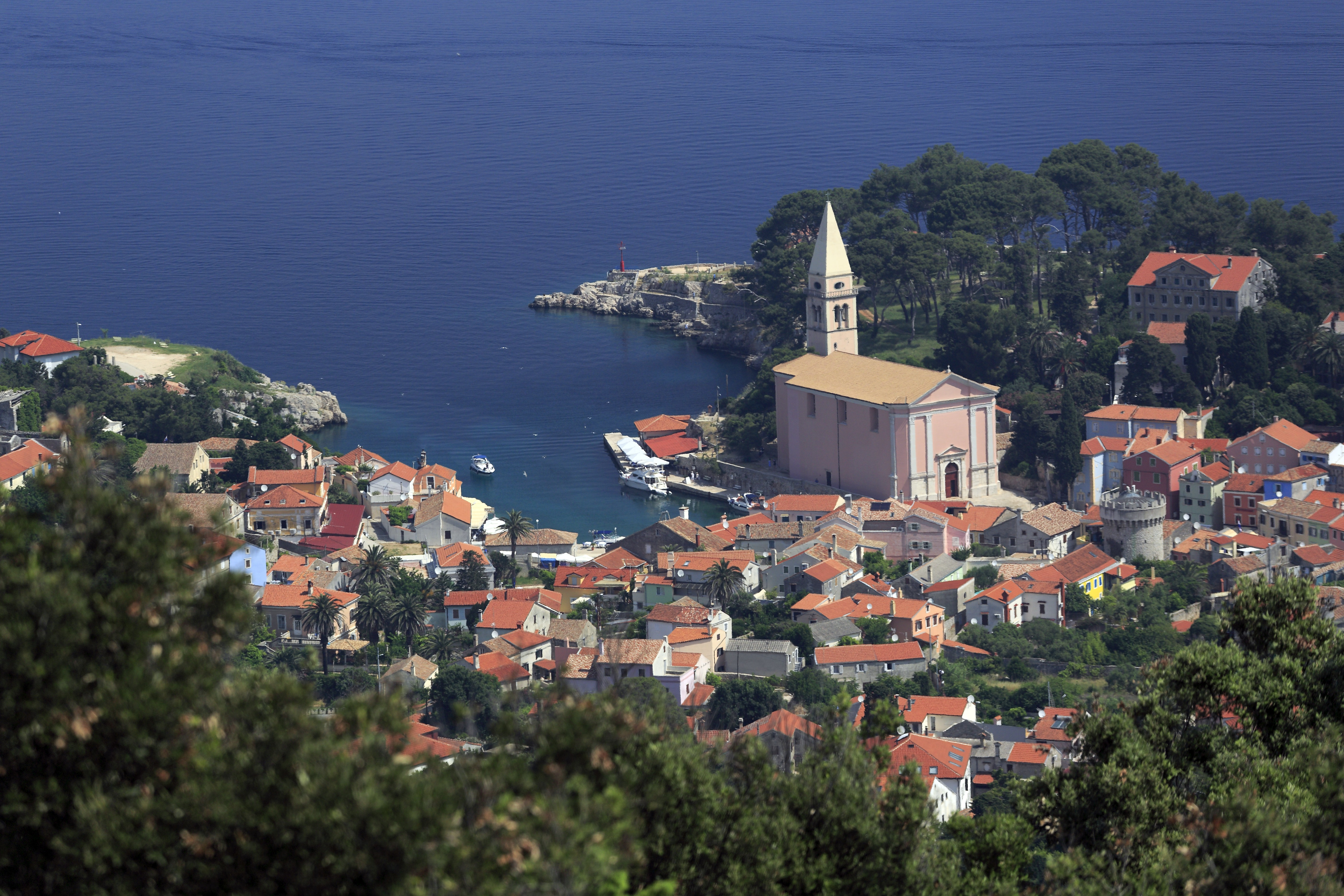 Vom Sveti Ivan, das Ortszentrum liegt um den Innenhafen. Die Kirche Sveti Antun ist durch ihre Lage und Größe aus jeder Richtung markant und aufffällig.